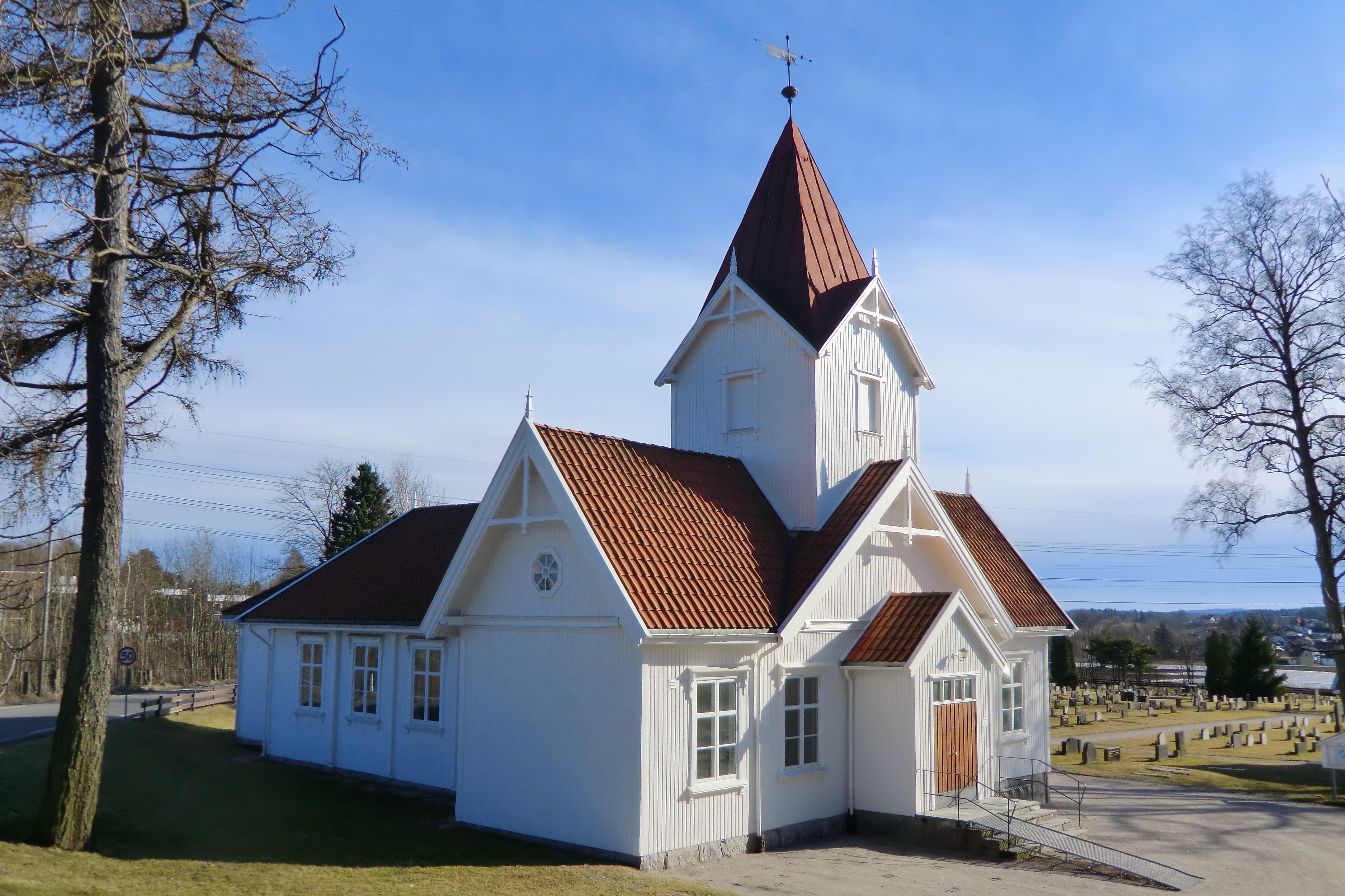 Hafslund kirke, Sarpsborg